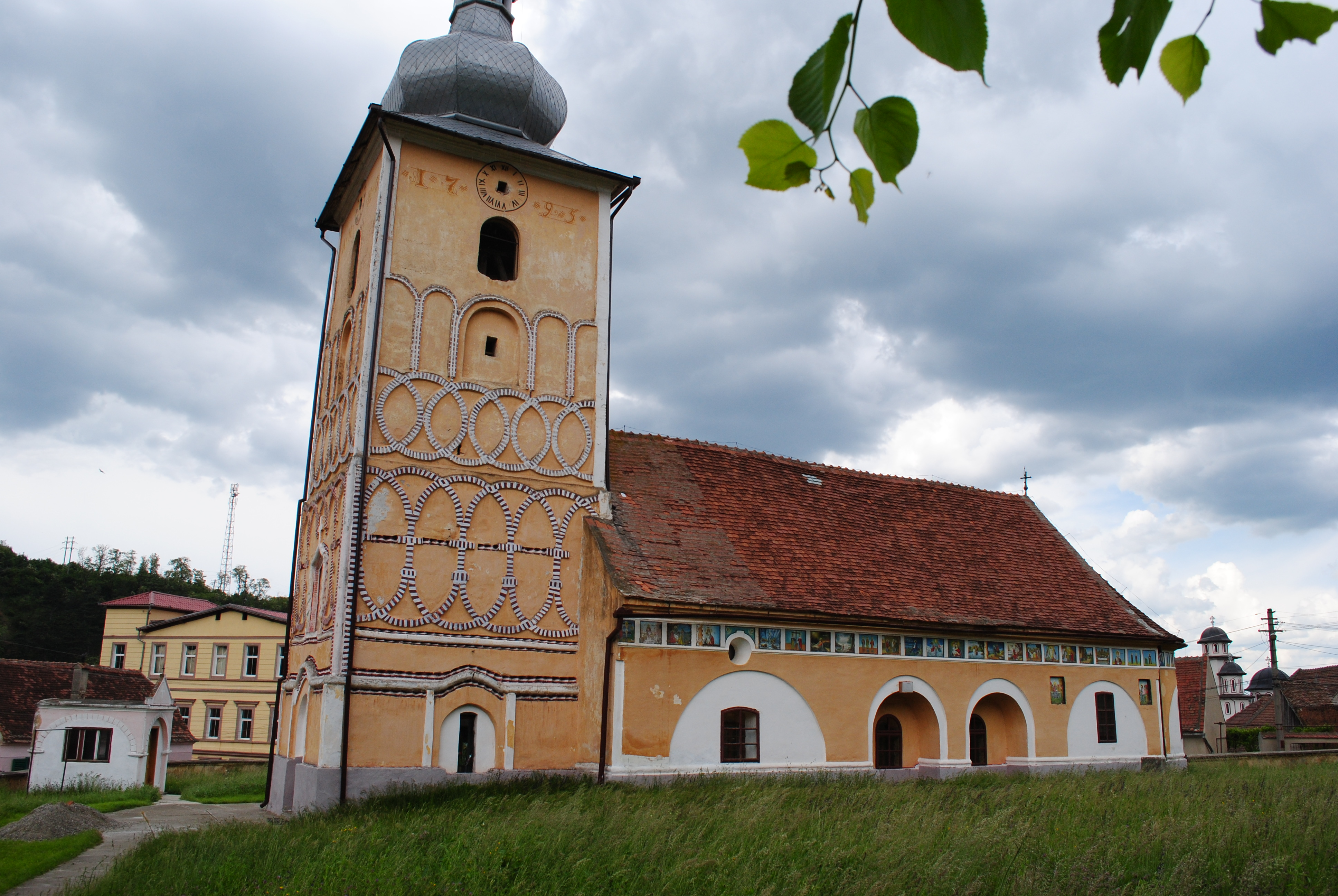 Ansamblul bisericii "Adormirea Maicii Domnului", sec. XVII - XVIII